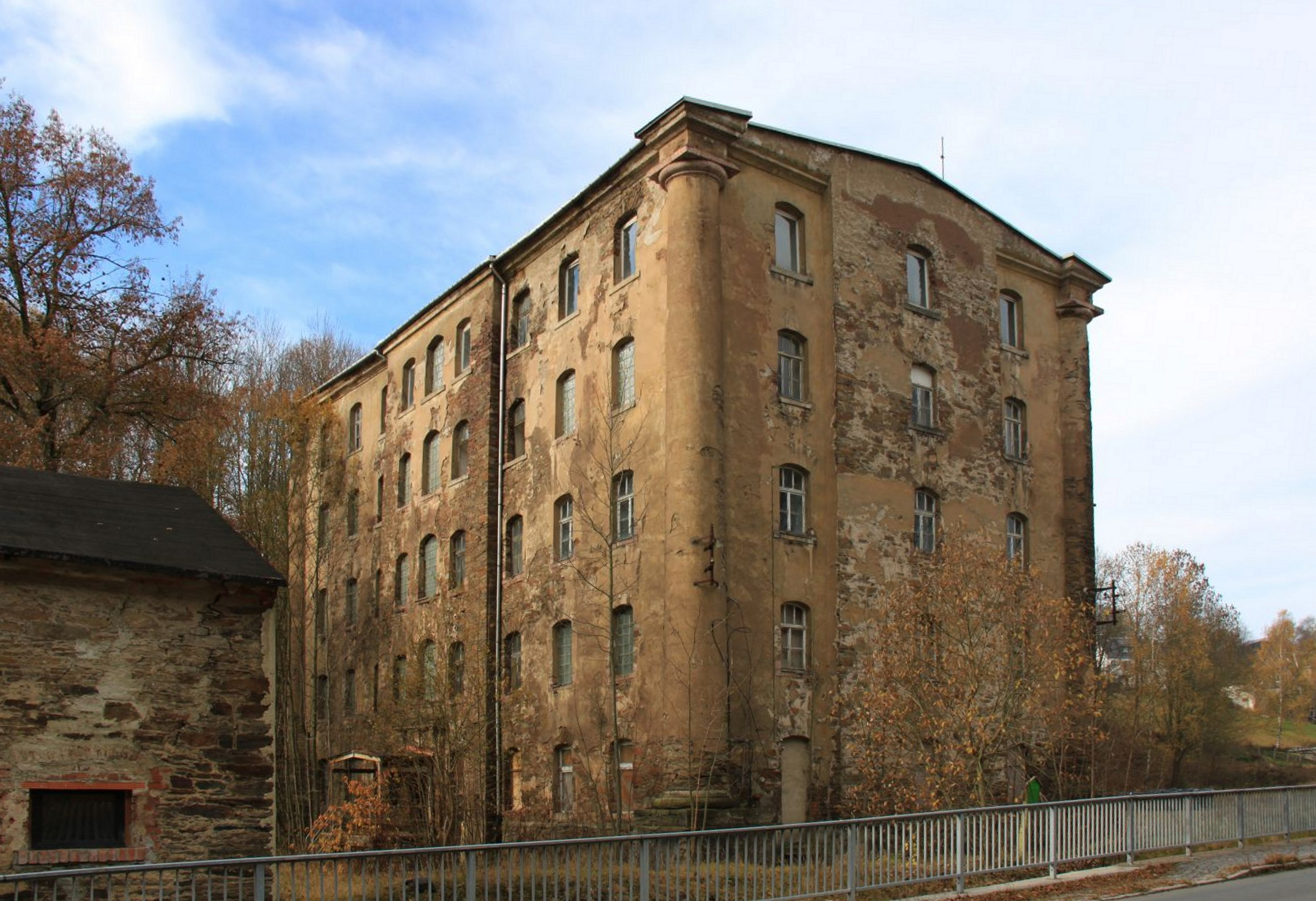 Fragment der ehemaligen Baumwollmaschinenspinnerei von Evan Evans in Siebenhöfen